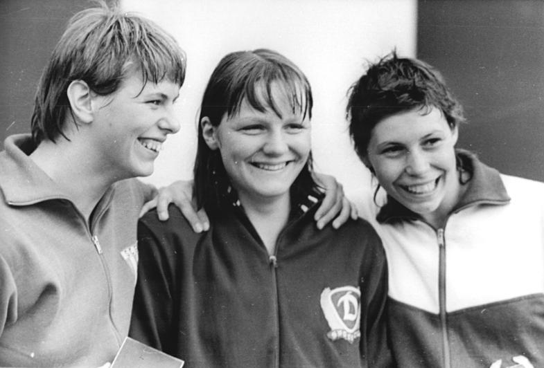 Andrea Eife, Gudrun Wegner, Karin Tülling ADN-ZB Gahlbeck 9-7-72-Leipzig:DDR-Meisterschaften im Sportschwimmen vom 8. bis 12.7.72 (1.Tag)-Die drei Erstplatzierten über 200-m-Freistil der Damen. Die 16jährige Andrea Eife (SC Dynamo Berlin,Mitte)holte sich den Meistertitel in der neuen DDR-Rekordzeit von 2:08,1 min vor Gudrun Wegner (SC Einheit Dresden,li.)und Karin Tülling vom SC Empor Rostock.